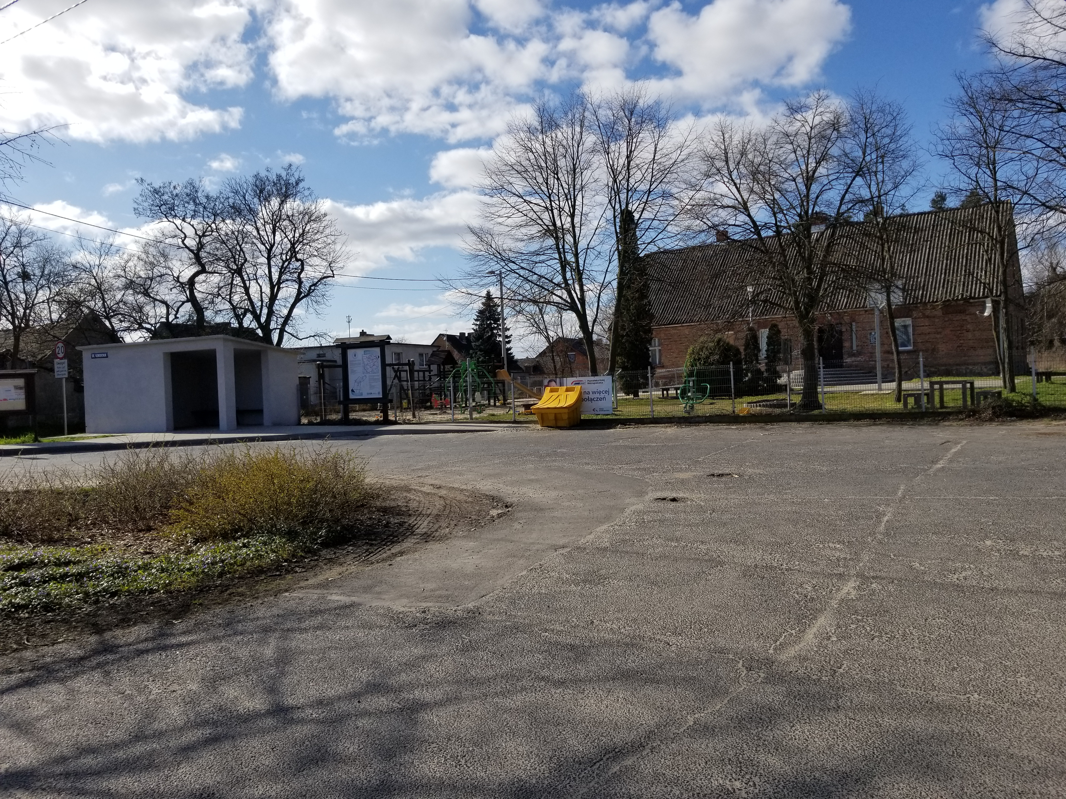 Pętla Gołuski, przystanek autobusowy oraz świetlica z boiskiem obok